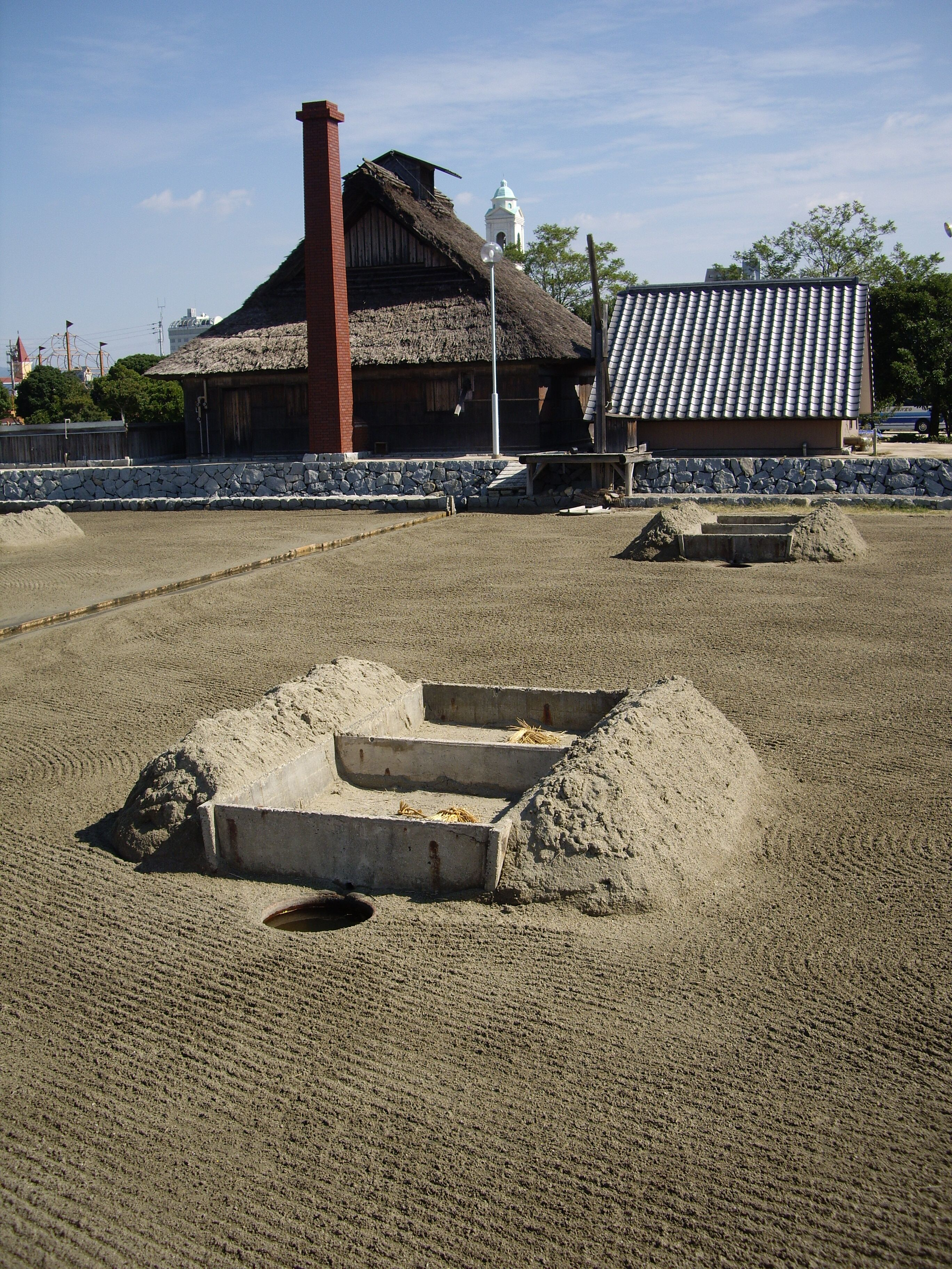 塩田（釜屋、濃縮台、沼井台など） ： 復元施設で宇多津町産業資料館に隣接する。 - 日本国香川県宇多津町（うたづ臨海公園）。